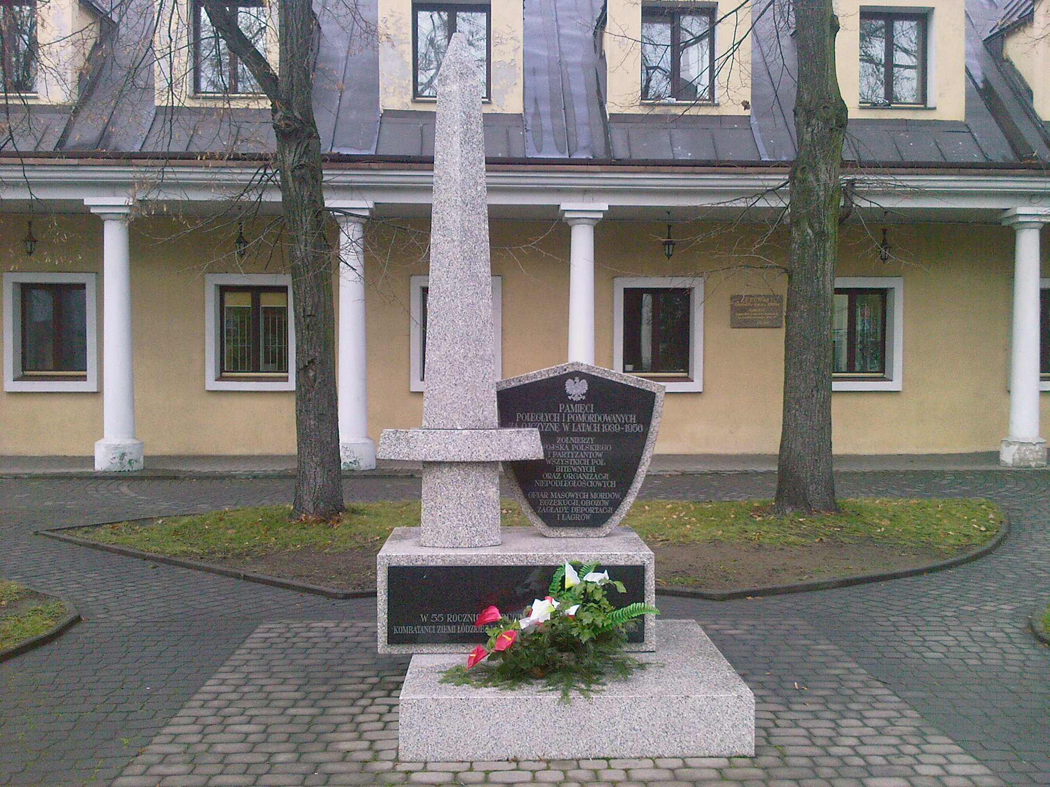 Pomnik martyrologii i walki narodu polskiego 1939-1956 w Aleksandrowie Łódzkim